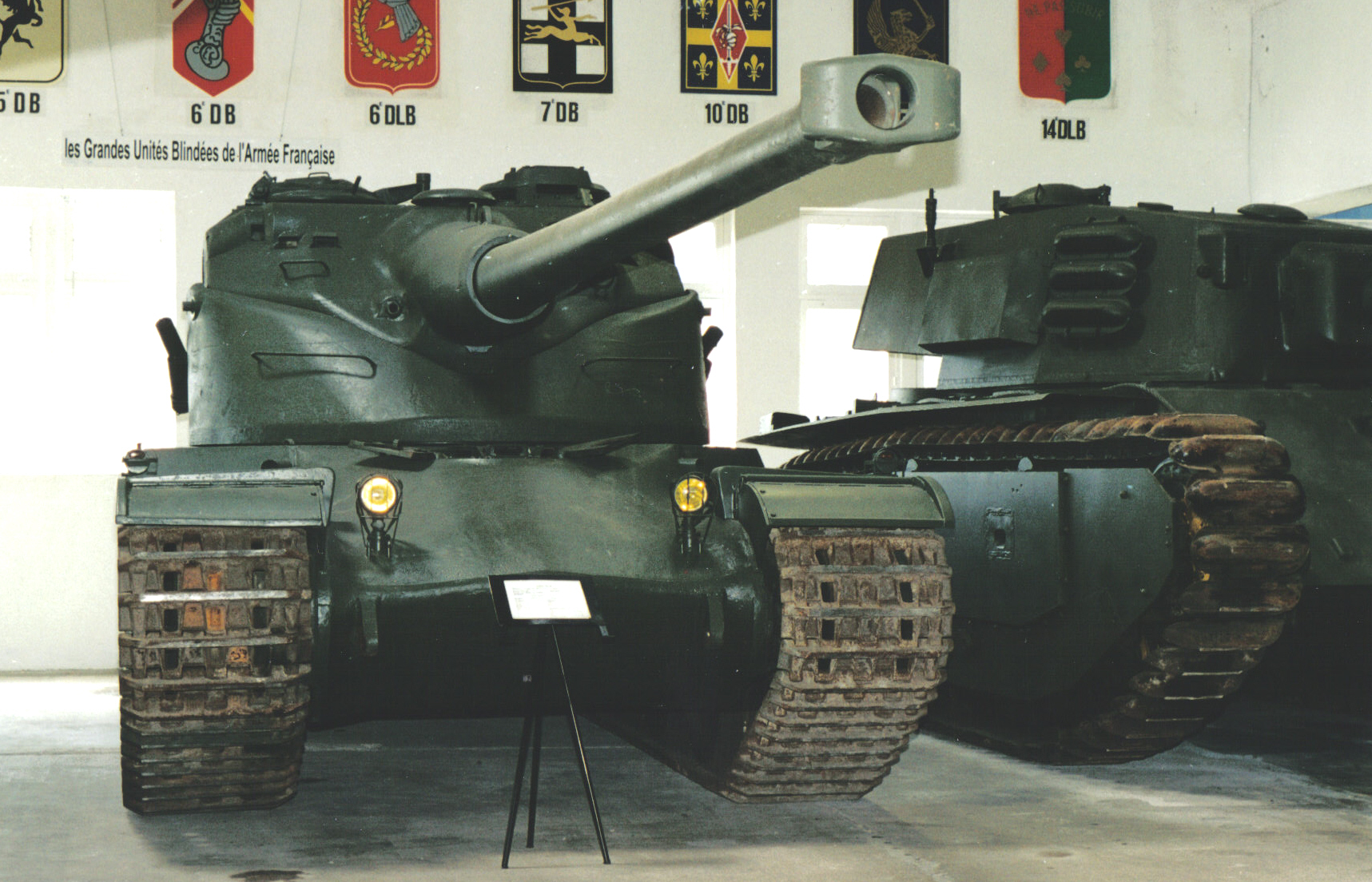 AMX-50 tank in Saumur